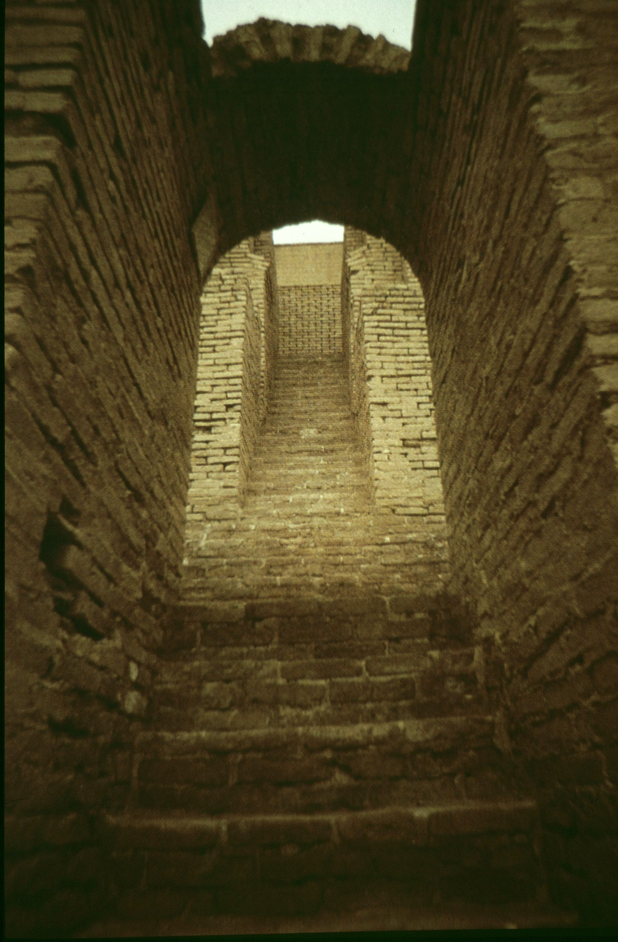 Tschogha Zanbil, Aufgang